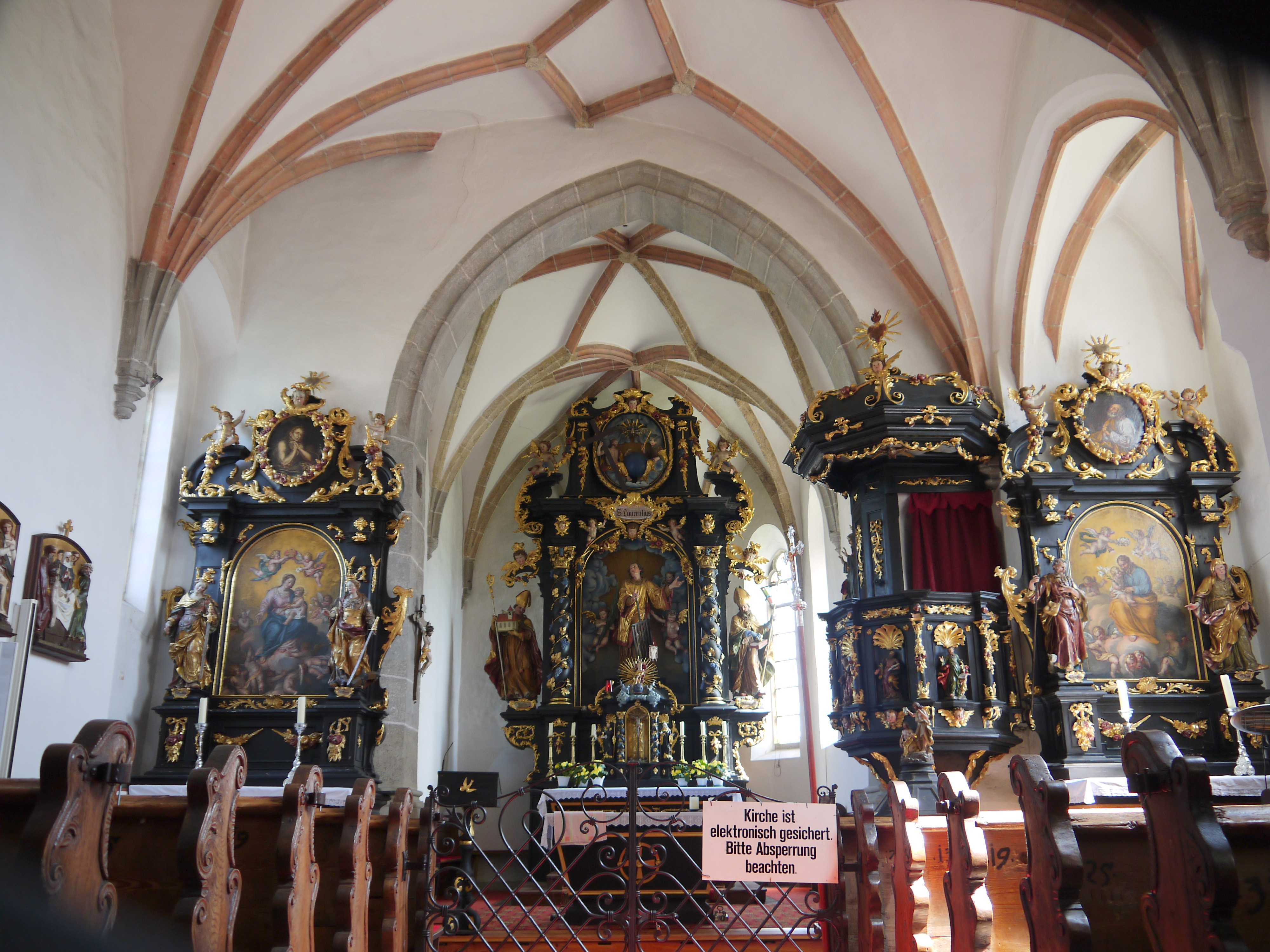 Kath. Pfarrkirche hl. Laurentius mit Friedhof